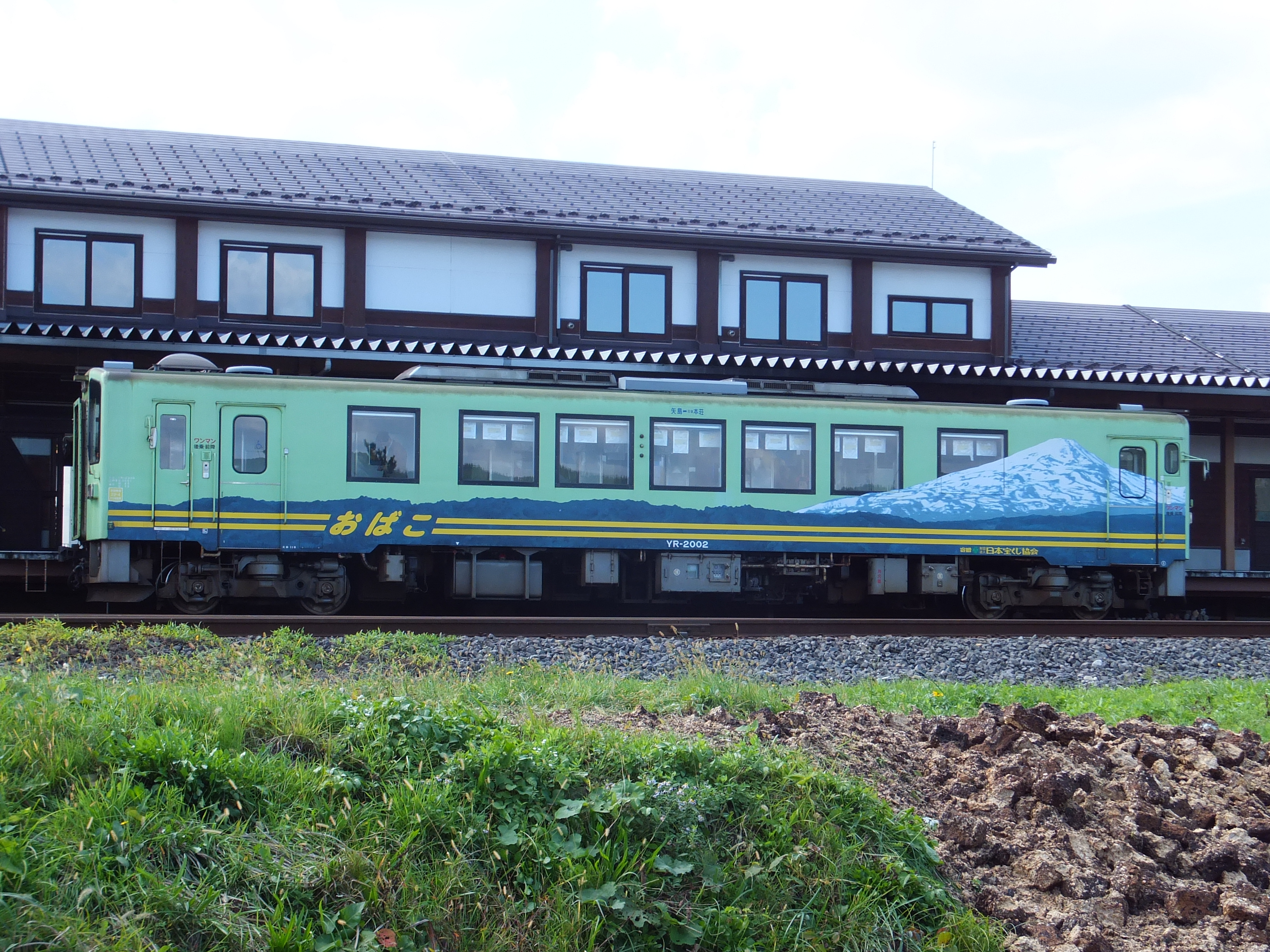 矢島駅で発車を待つYR-2000形2002号。車体側面には鳥海山が描かれている。